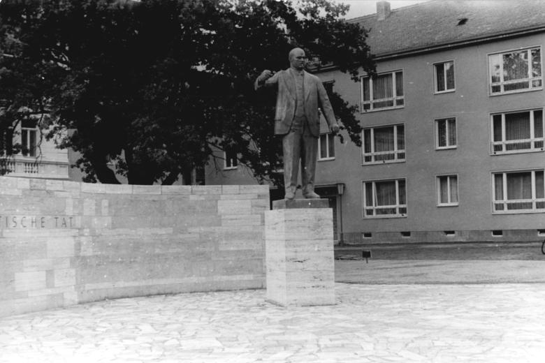 Weimar, Ernst Thälmann-Denkmal ADN-ZB Freese Vgt-Schm 15.8.1958 Ernst Thälmann-Denkmal in Weimar Am 17.8.1958 in Weimar ein Ernst Thälmann-Denkmal auf dem Platz der 56.000 eingeweiht. UBz: Das überlebensgrosse Denkmal ist ein rund 18 Ztr. schwere Bronze-Hohlguss und wurde bei der Erzgießerei Franz Pirner gegossen.